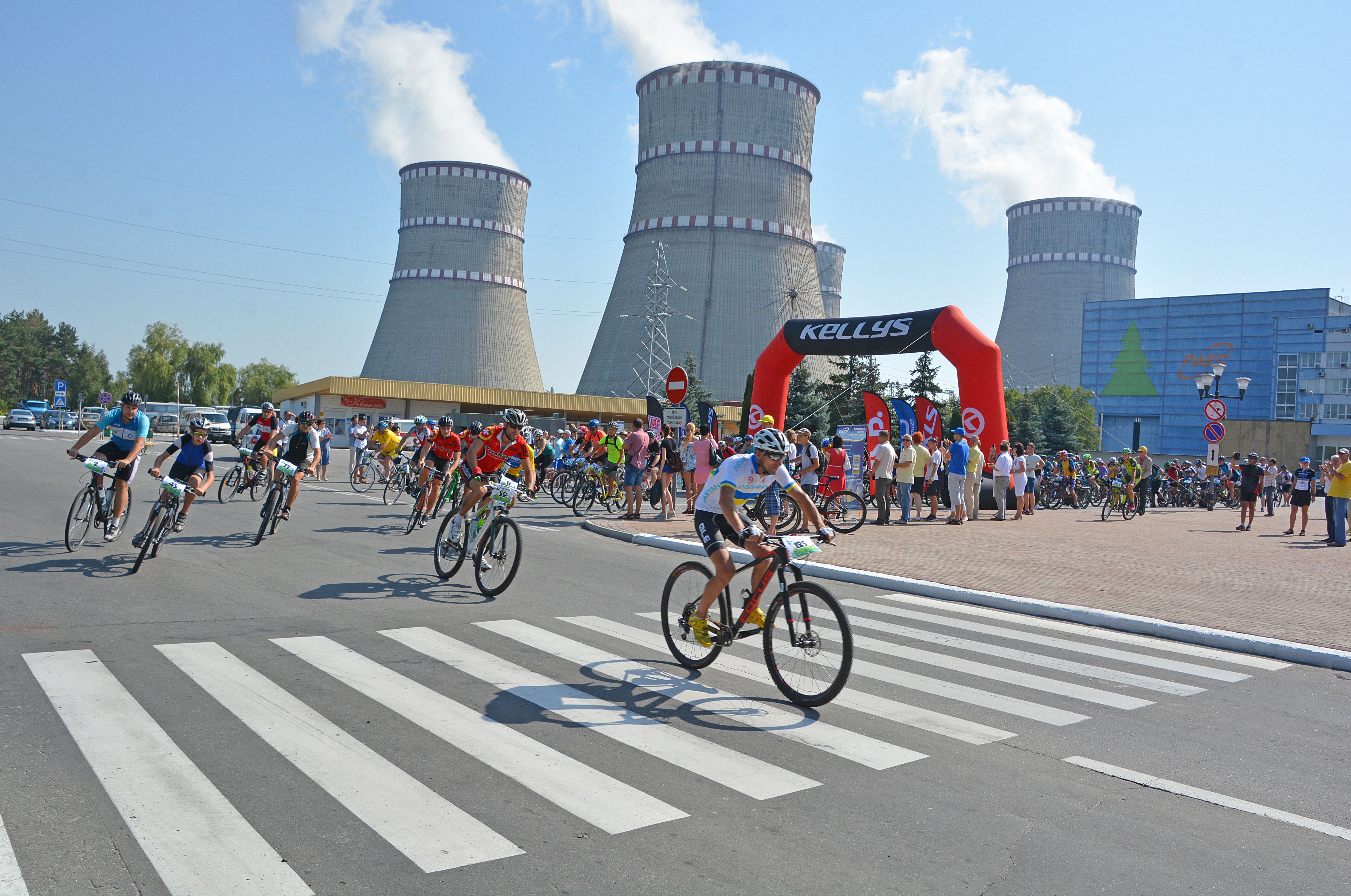 Учасники стартують від РАЕС